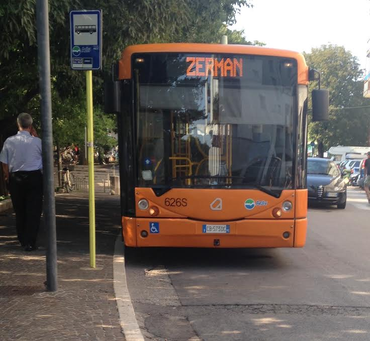 Autobus 626S MAN Autodromo Busotto SL.26 NG 313 di ACTV S.p.A. Venezia, presso Stazione FS di Mogliano, in servizio extraurbano sulla Linea 14E, diretto a Zerman